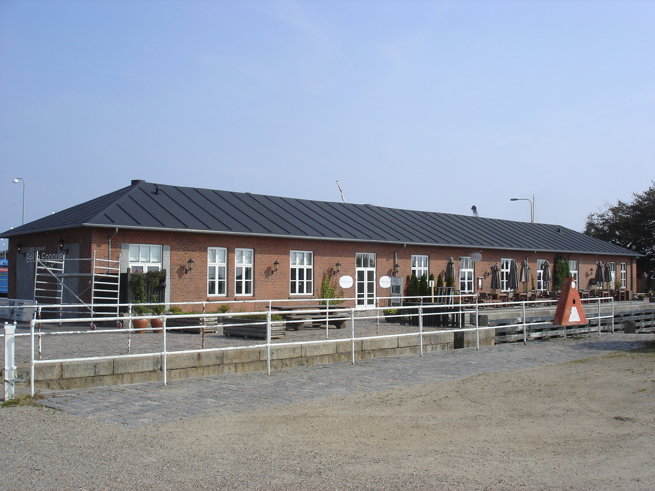 Nykøbing Mors, ekspeditionsbygningen ved færgelejet fra S